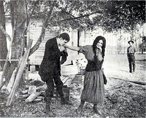 JP McGowan, Gene Gauntier and Jack Clark in the backgroung